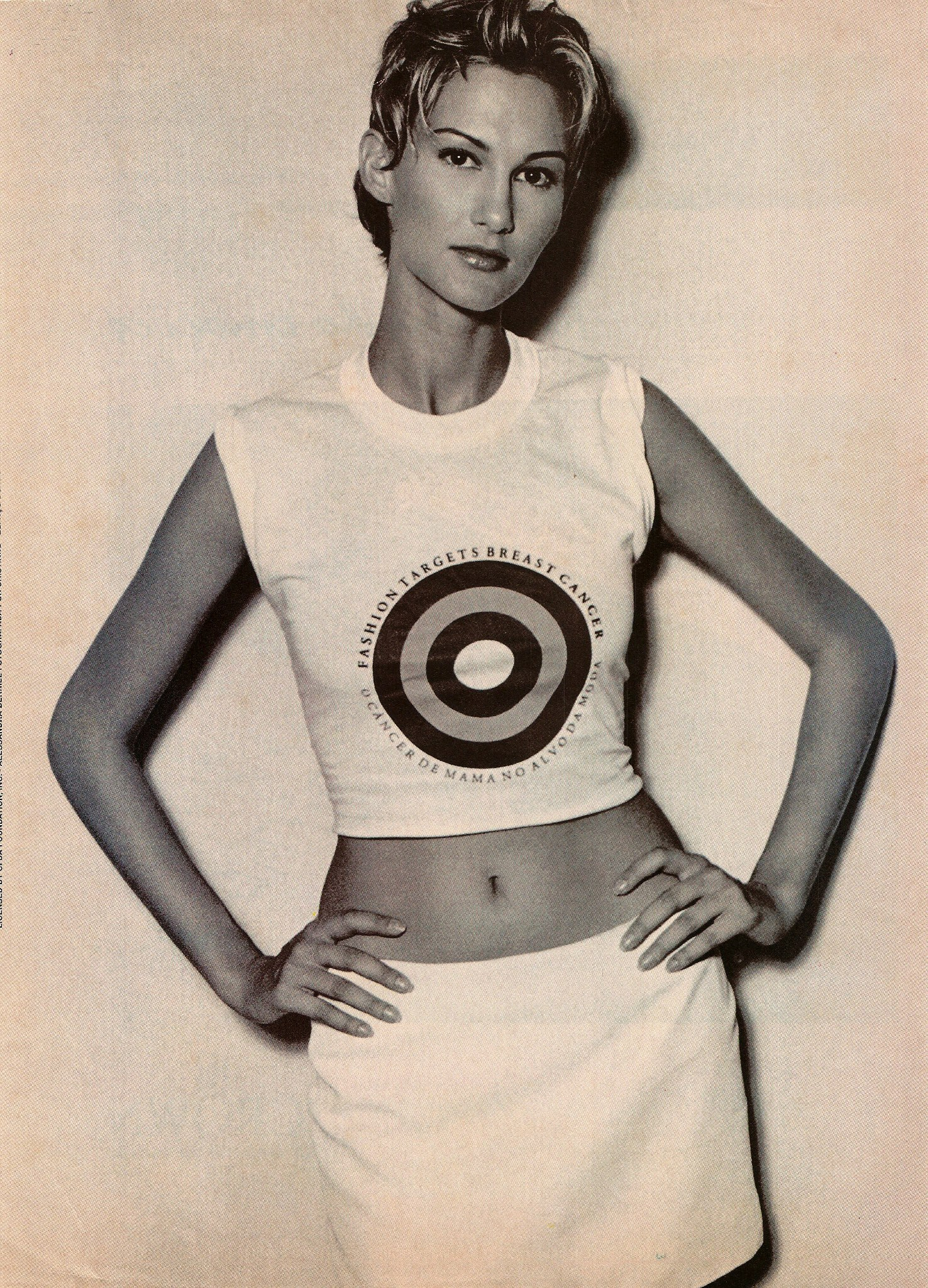 A modelo internacional Alessandra Berriel posa com a camiseta oficial da campanha "O Câncer de Mama no Alvo da Moda".